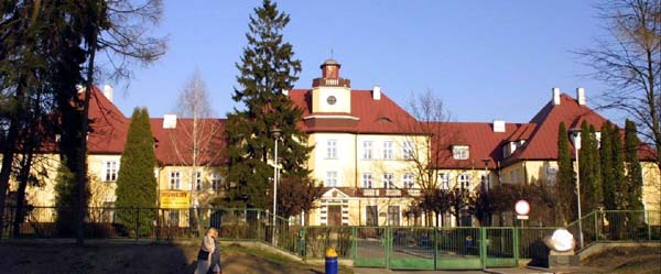 Ostrów Mazowiecka, ul. Kościuszki 36 - szkoła projektu Mariana Straszaka, 1923-1926.